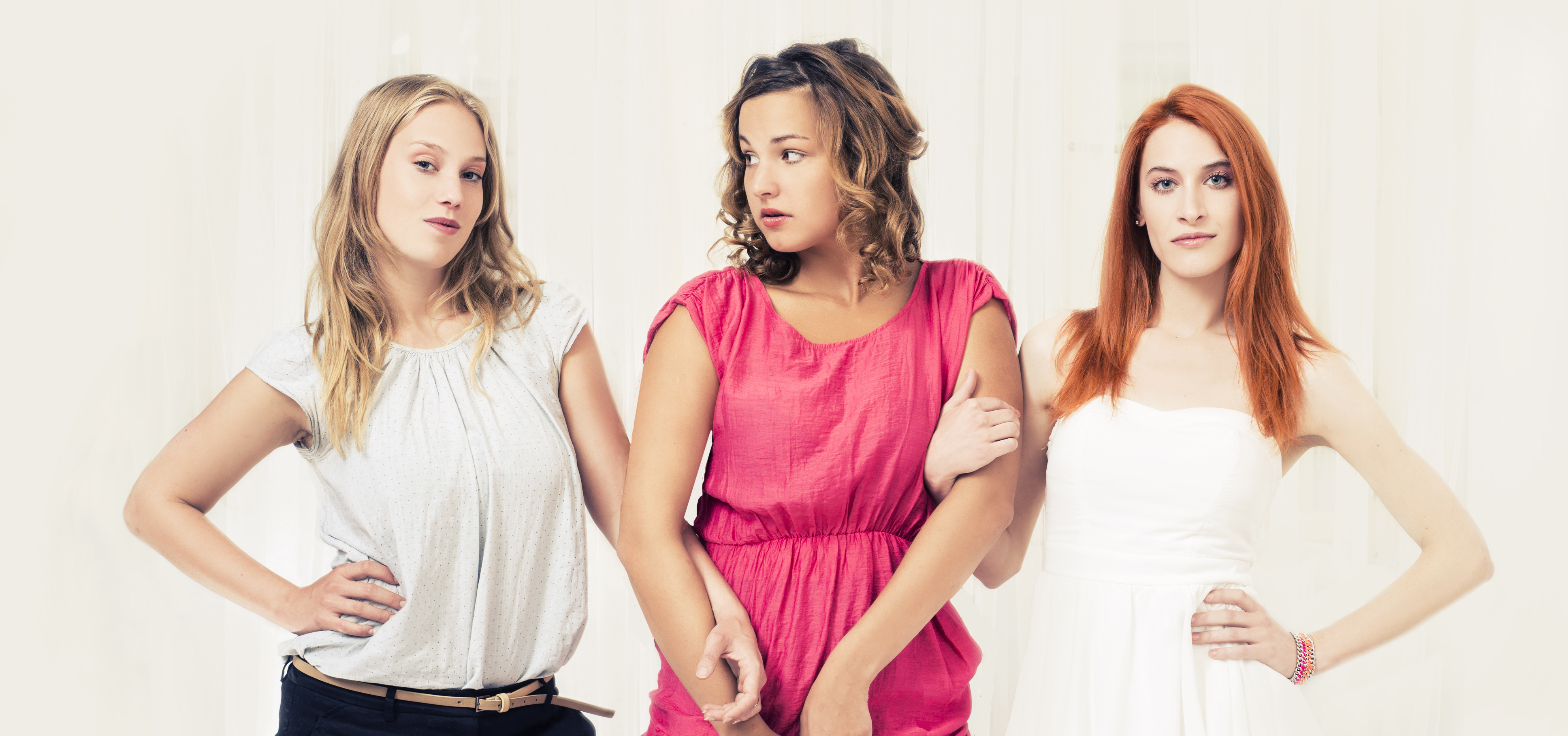 z filmu Šťastná